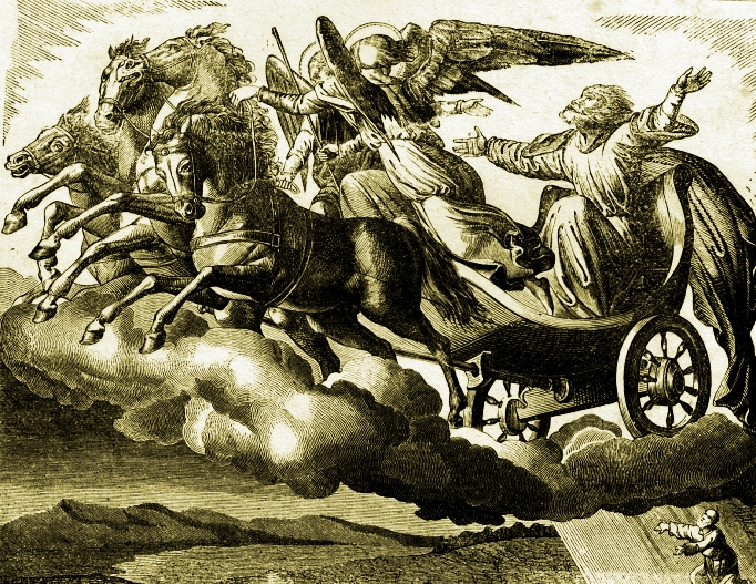 "Wniebowzięcie Eliasza". Rycina ze schrobenhausenowskiego warsztatu Carla Poellath